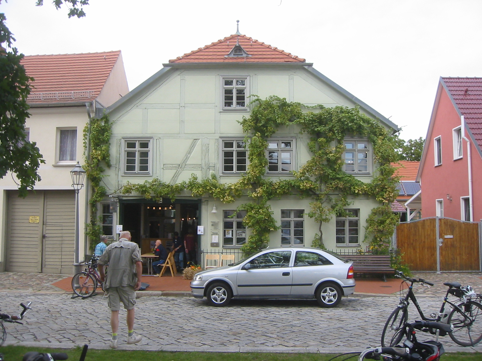 Denkmalgeschütztes Haus am Salzmarkt 5 in Mittenwalde (Brandenburg); heute Sitz des Heimatmuseums